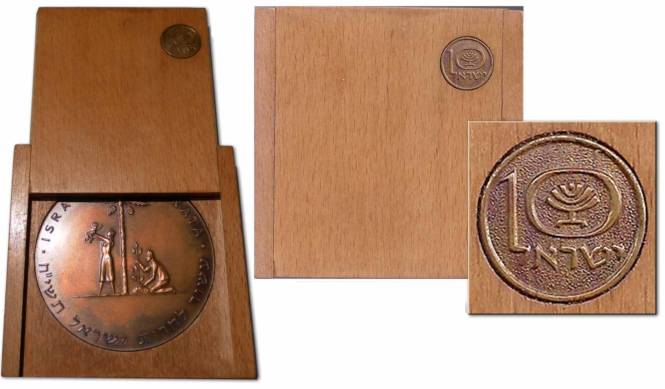 מדליית שחרור דור ב נחושת קופסא סלייד